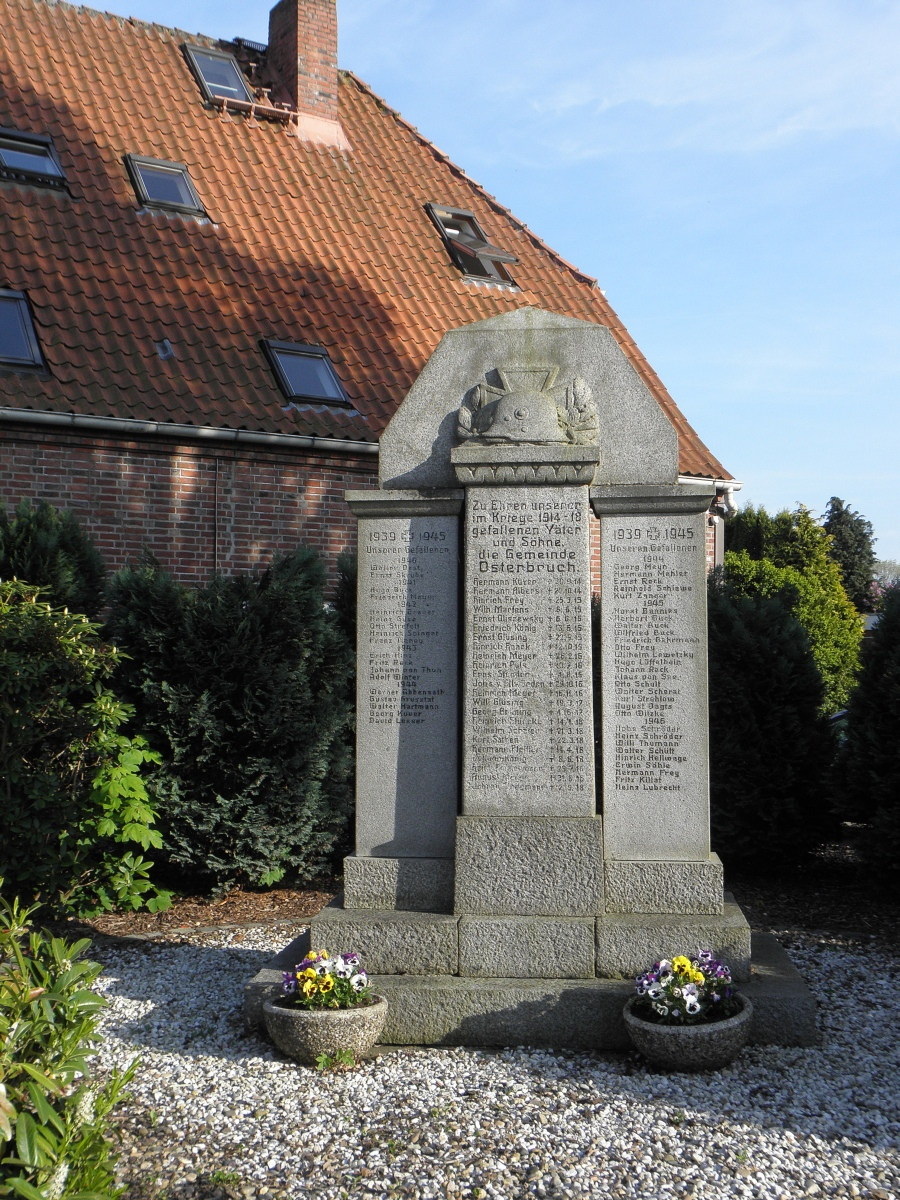 Bilder aus Osterbruch